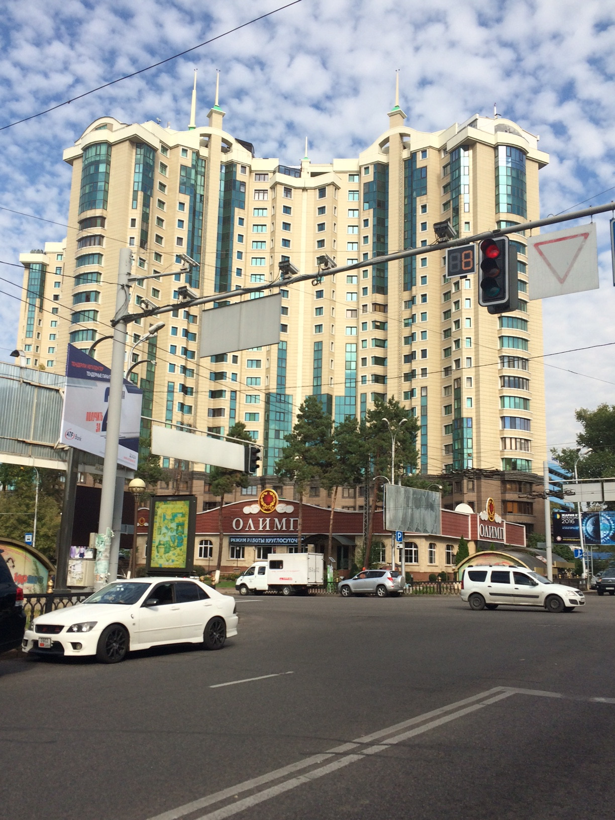 Жилой комплекс "Столичный центр", Алматы